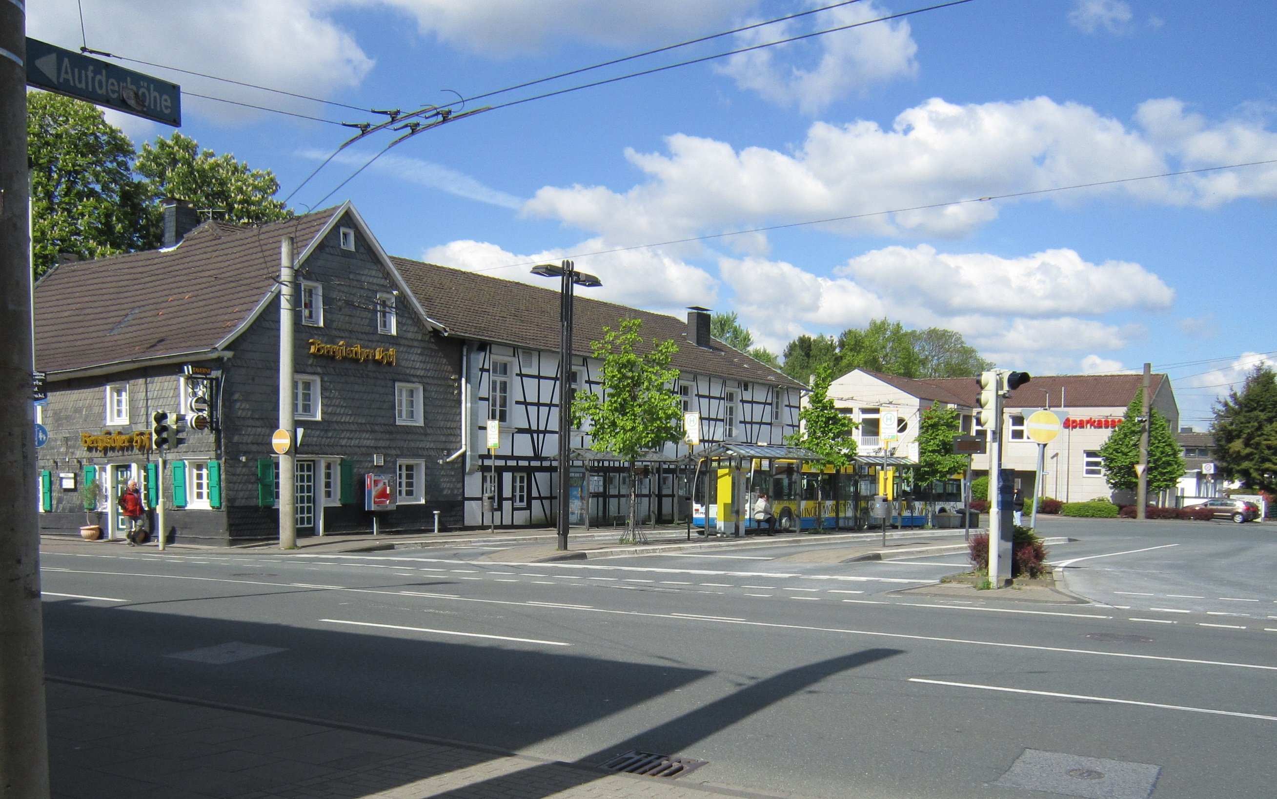 Aufderhöhe mit Busbahnhof, aufgenommen im Frühling 2017